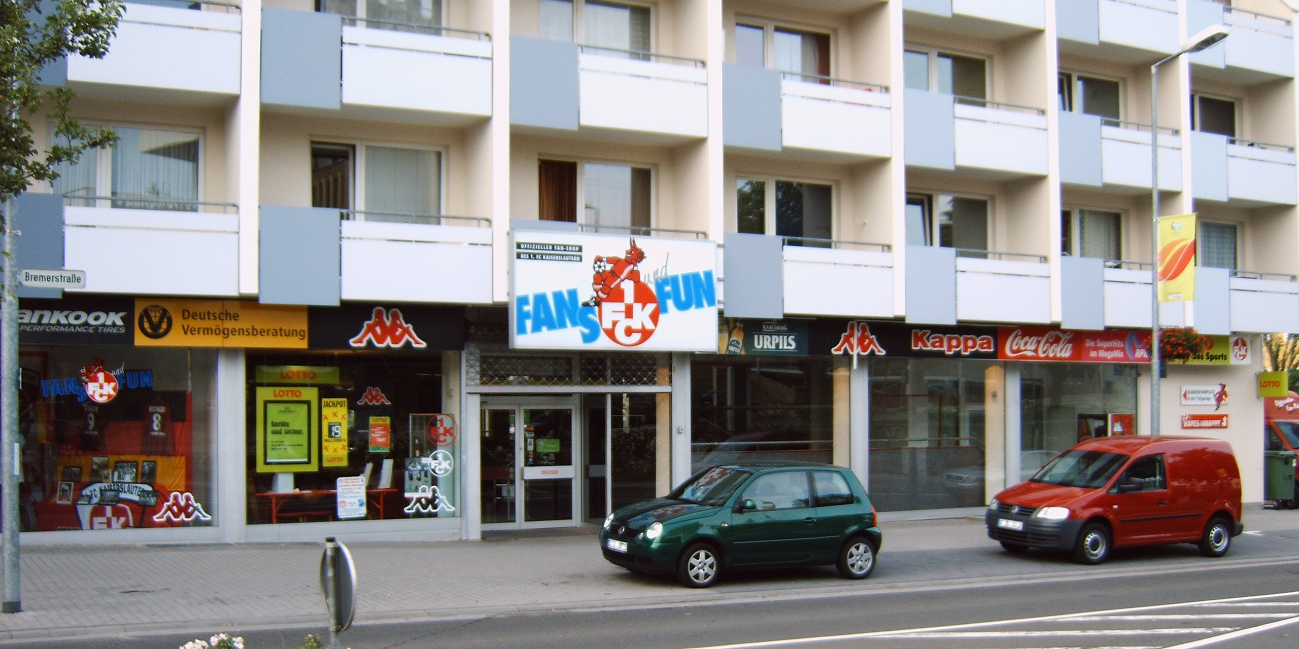 w:1. FC Kaiserslautern-Fanshop in Kaiserslautern